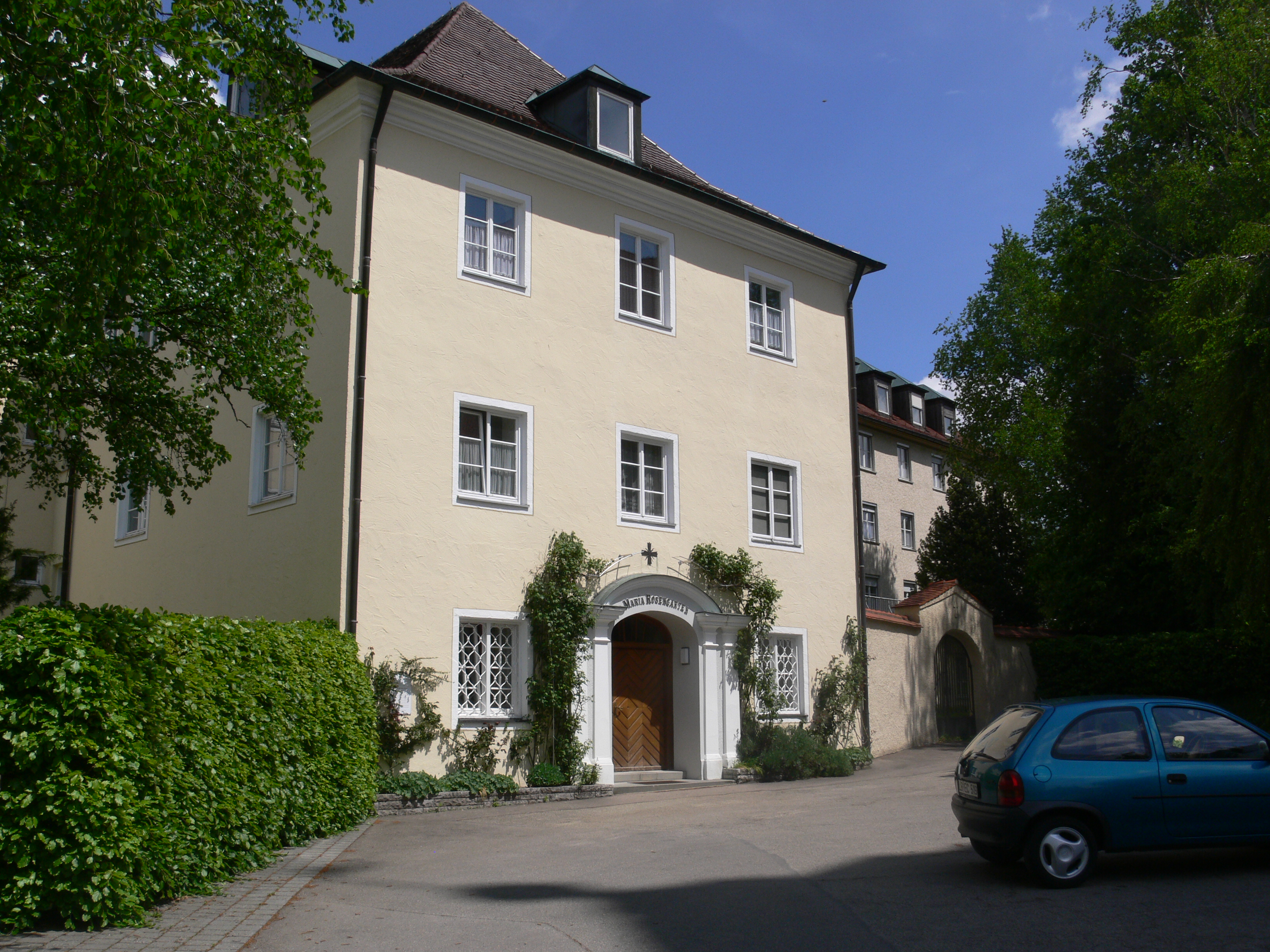 Bad Wurzach, Landkreis Ravensburg, Baden-Württemberg Kloster Maria Rosengarten